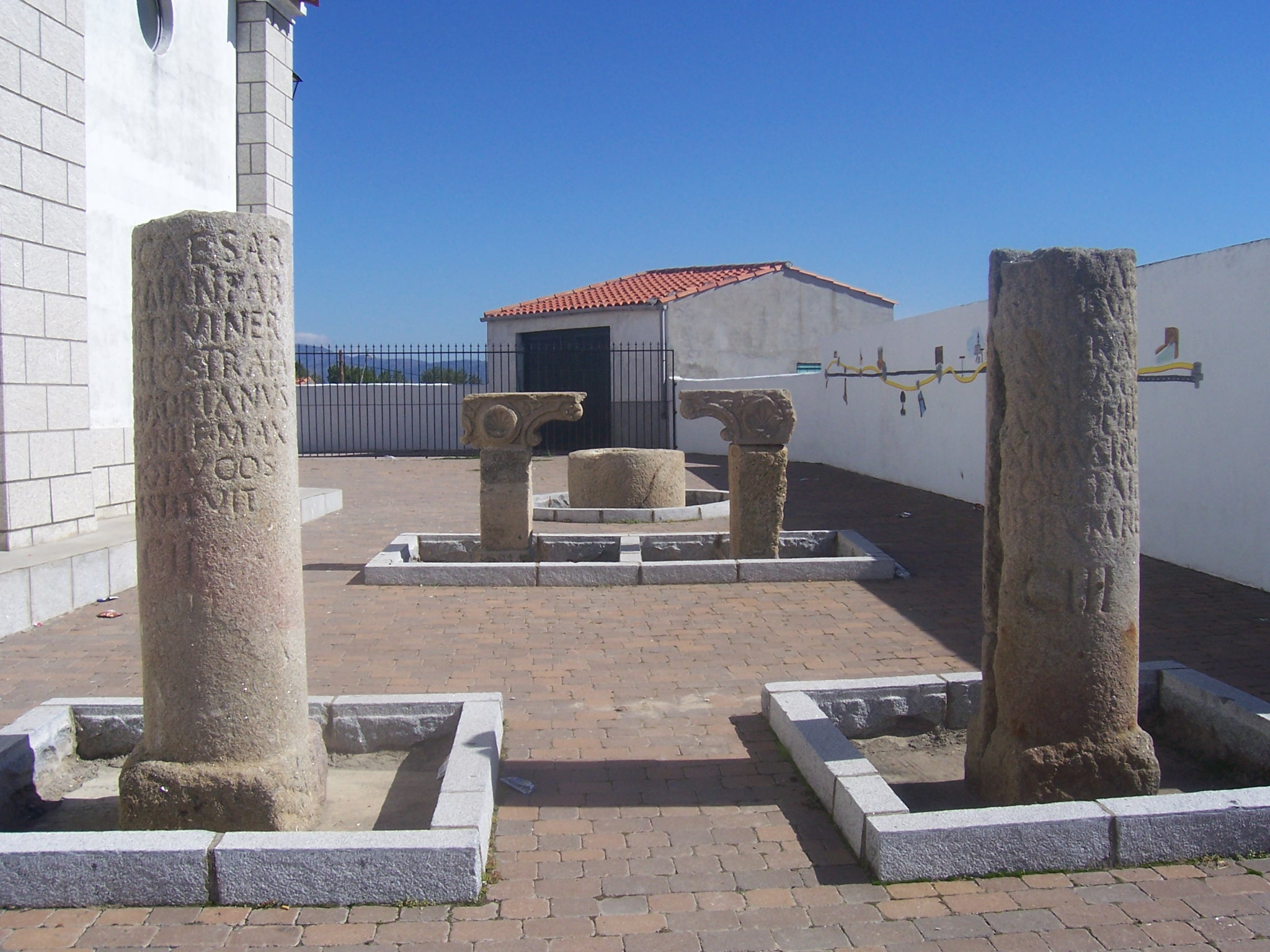 Restos romanos junto a la Iglesia de Santiago Apóstol, en Carcaboso, Cáceres, España (2007)